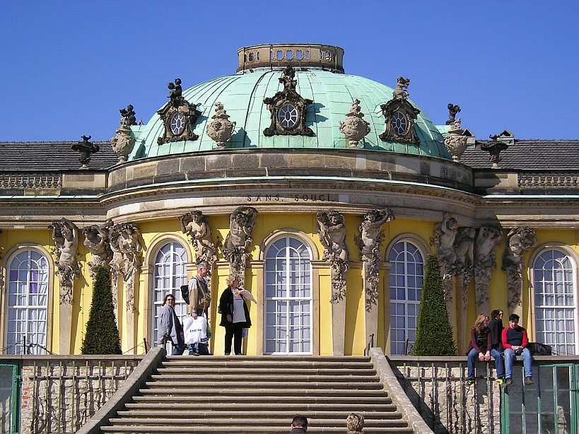 Schloss Sanssouci